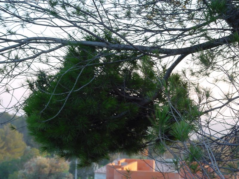 Maladie du "balai de sorcière" sur un pin